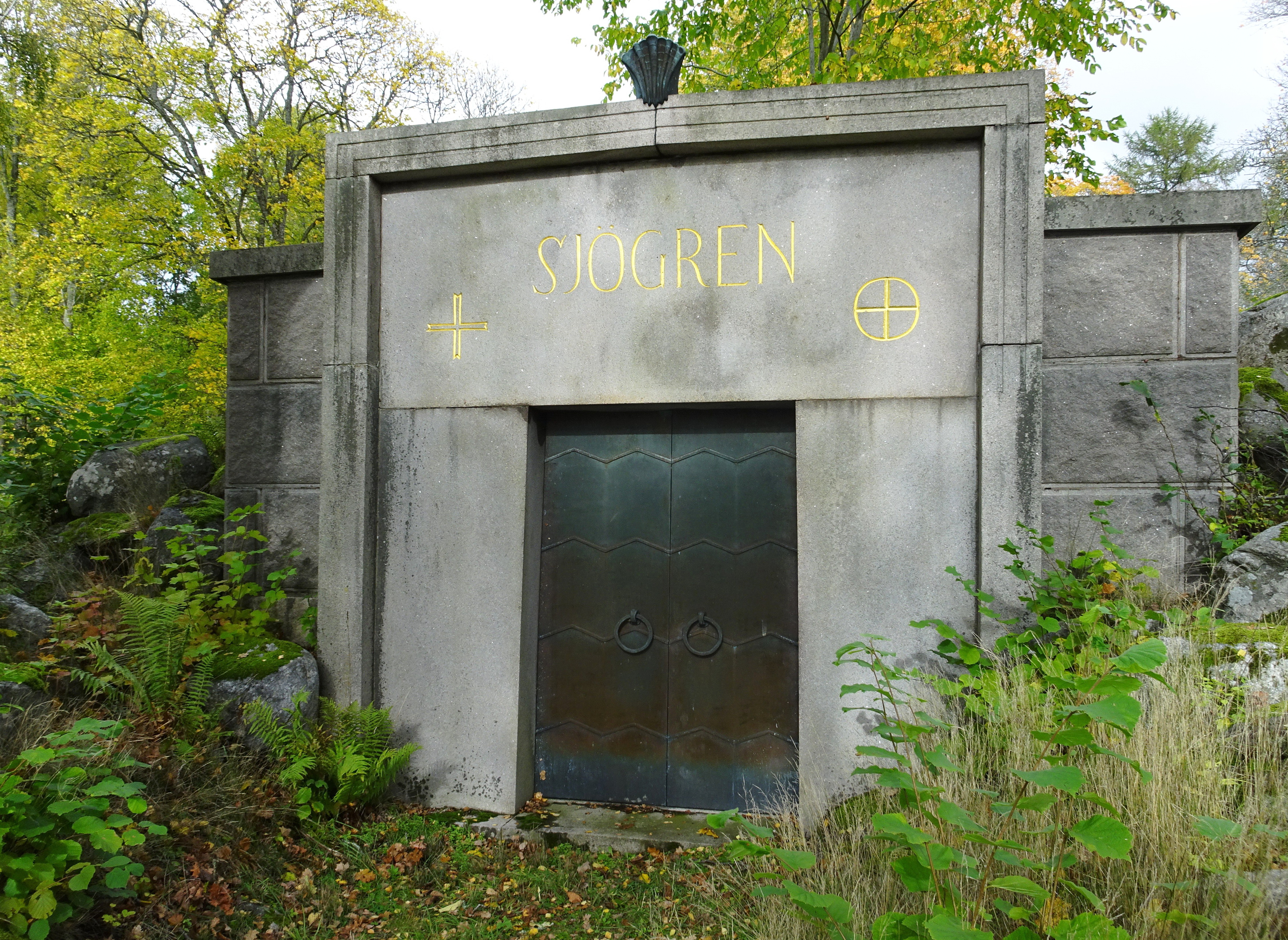 Hjalmar och Anna Sjögrens mausoleum vid Nynäs gård